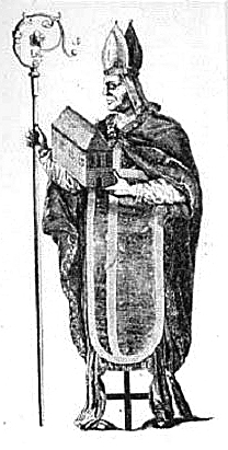 Bischof Vicelin. Kupferstich 1590 nach einem verlorenen älteren Bild